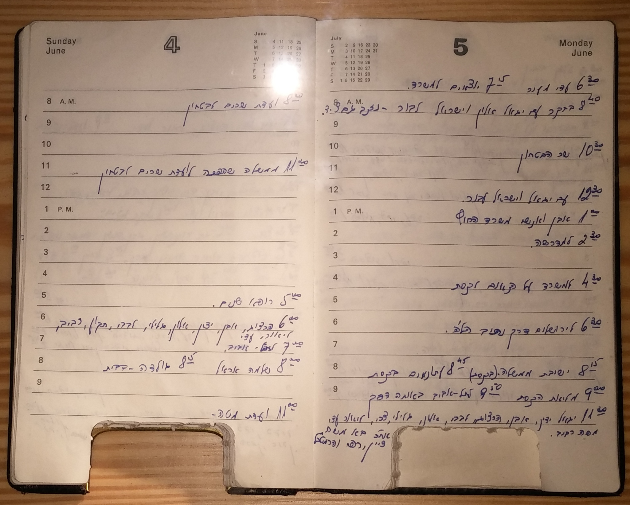 לוי אשכול יומן 4 ו-5 ביוני 1967